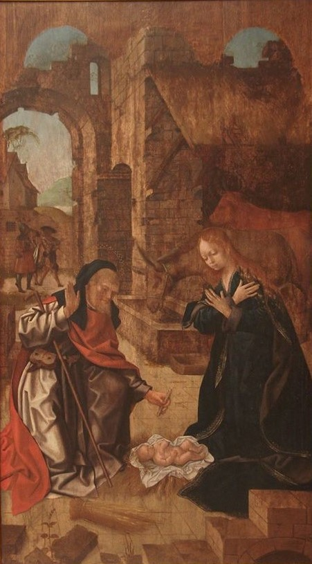 "Natividade" (c. de 1503-1508), pintura a óleo sobre madeira de Francisco Henriques, na Casa dos Patudos, em Alpiarça.